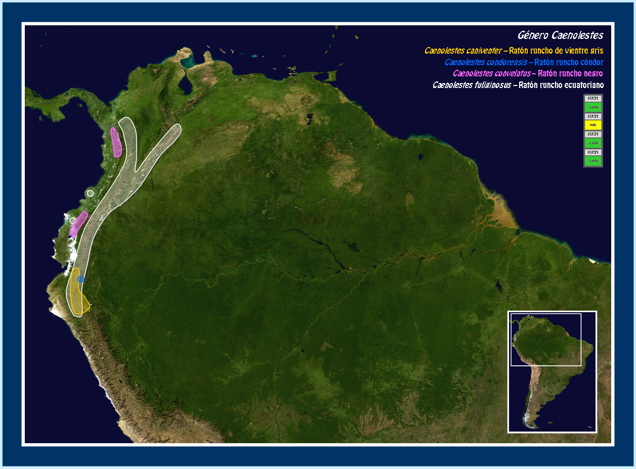 Mapa del área de distribución de Caenolestes sp.